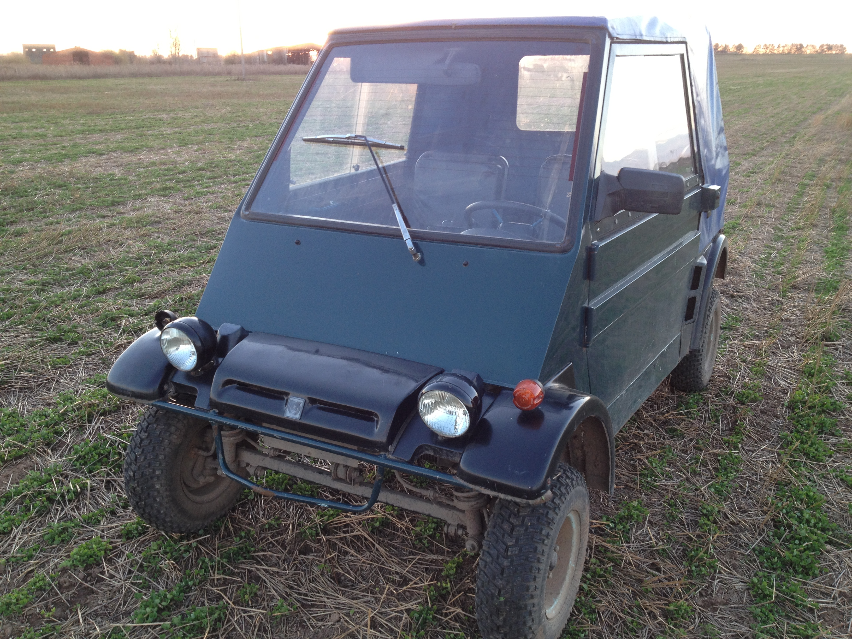 Производился на ОАО Автоагрегат, г. Кинешма, с 1996 по 2002 гг.